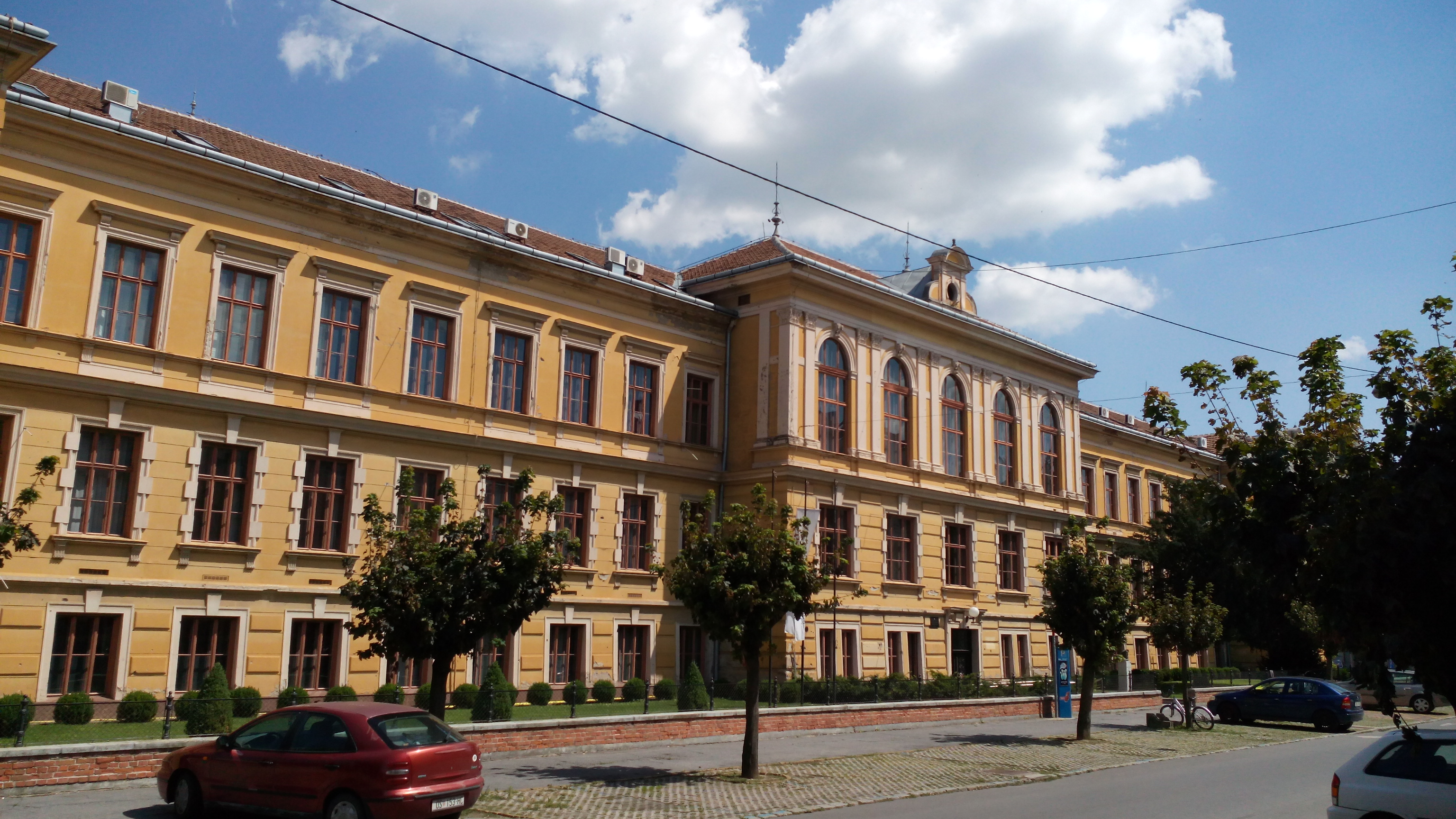 Filozofski fakultet u Osijeku.